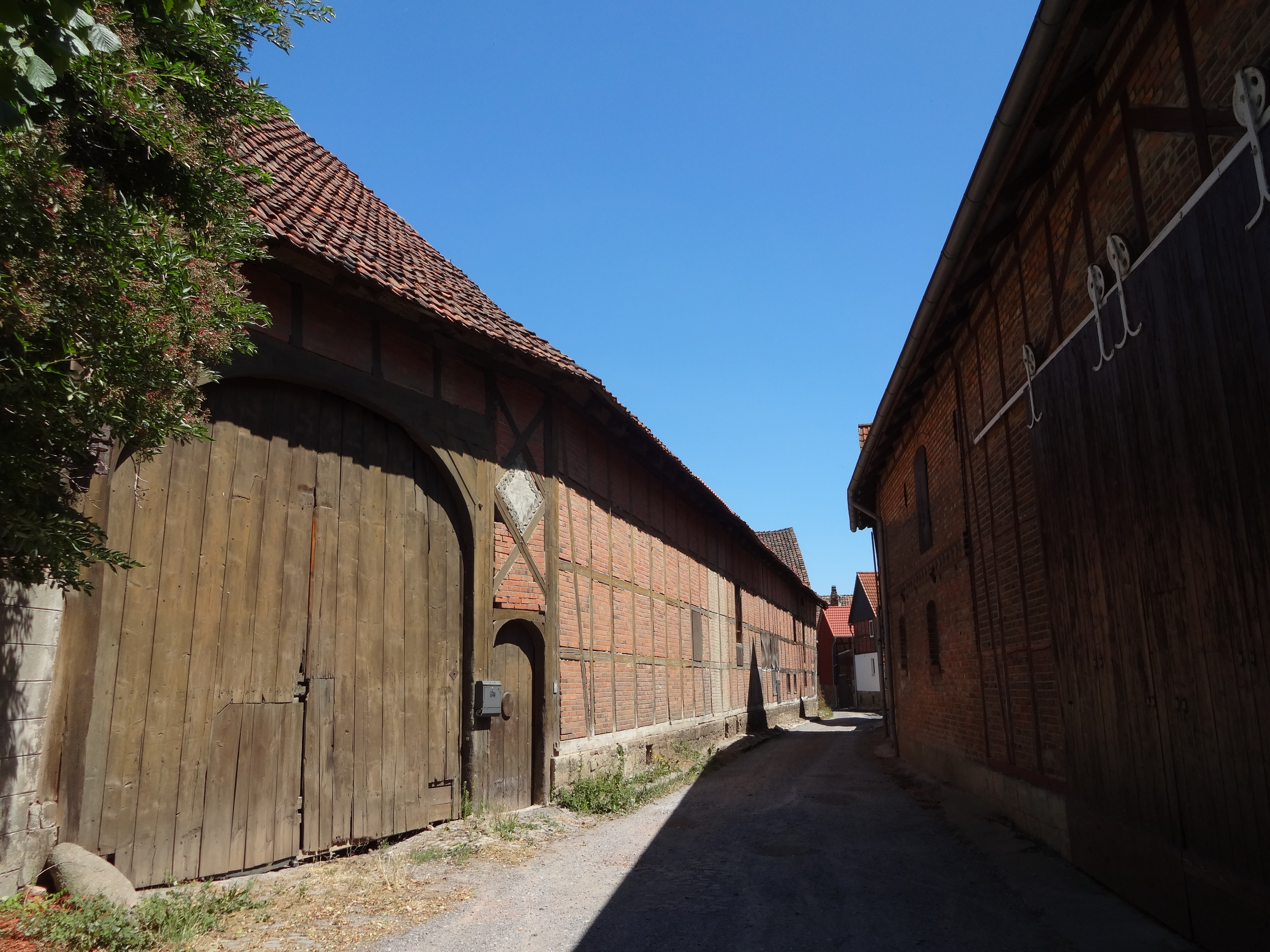 denkmalgeschütztes Bauerngehöft in der Wrampestraße 1 in Dedeleben